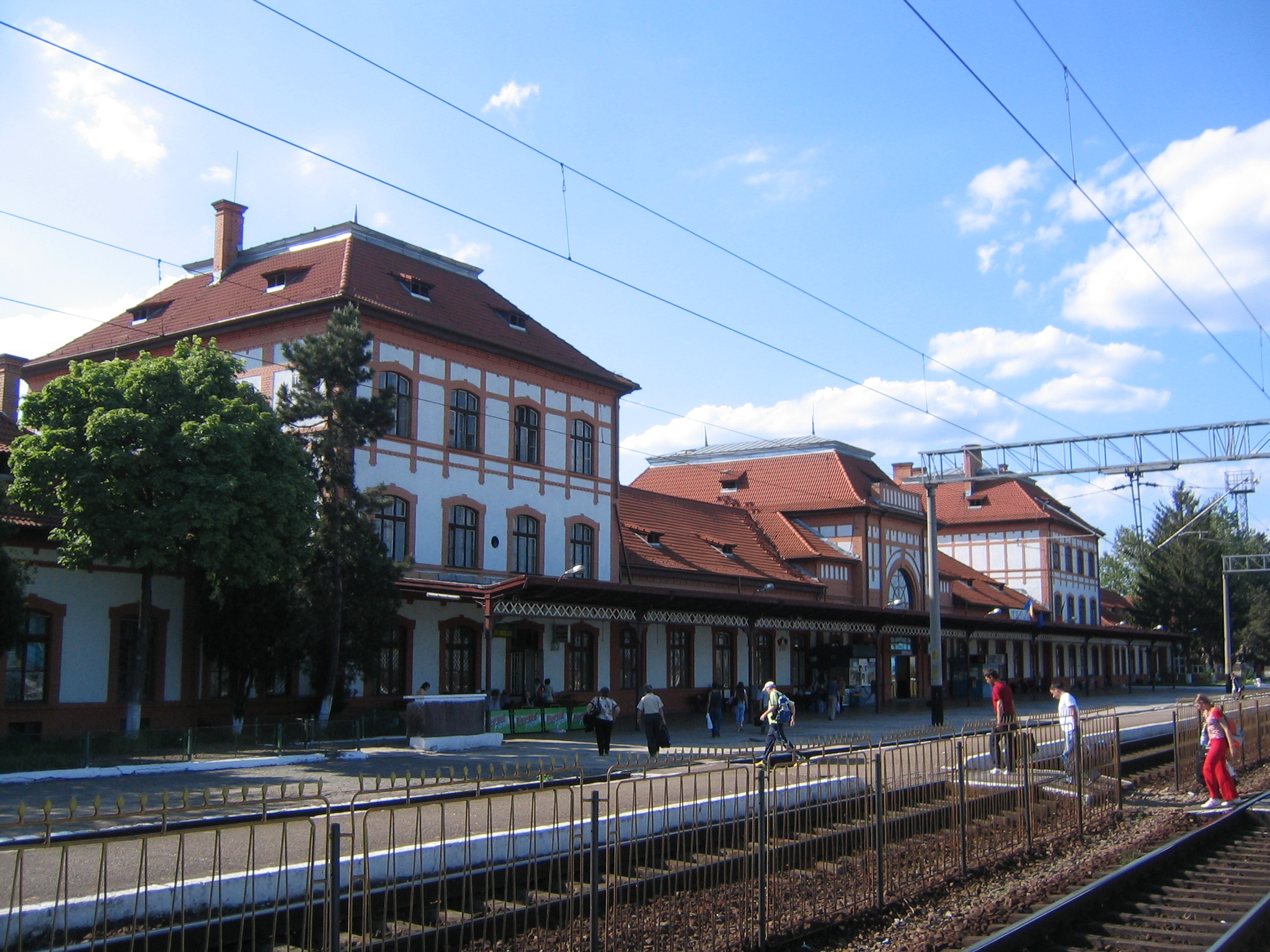 Gara din Teiuş